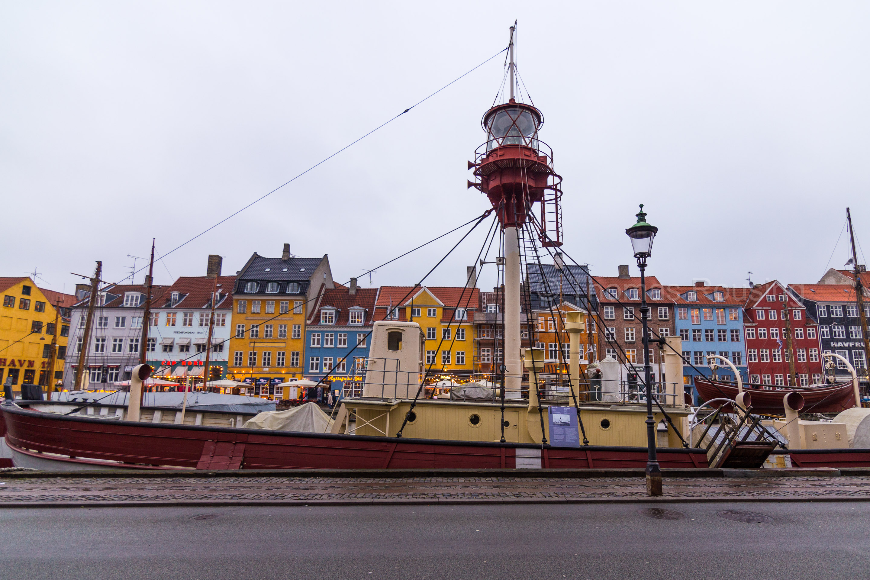 Lightvessel Gedser Rev at Nyhavn in Copenhagen, Denmark